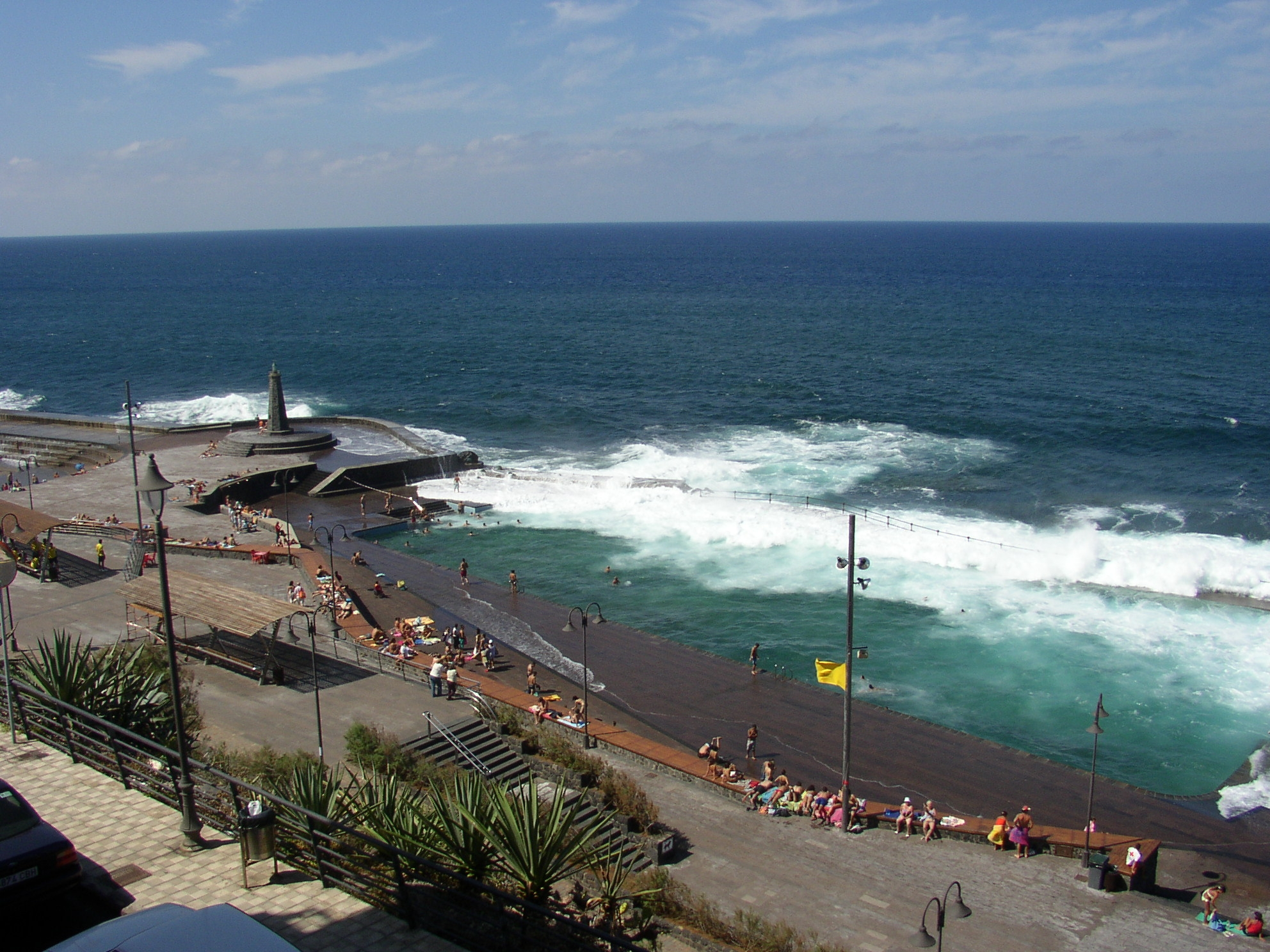 Meerwasserschwimmbecken in Bajamar (La Laguna) bei Flut